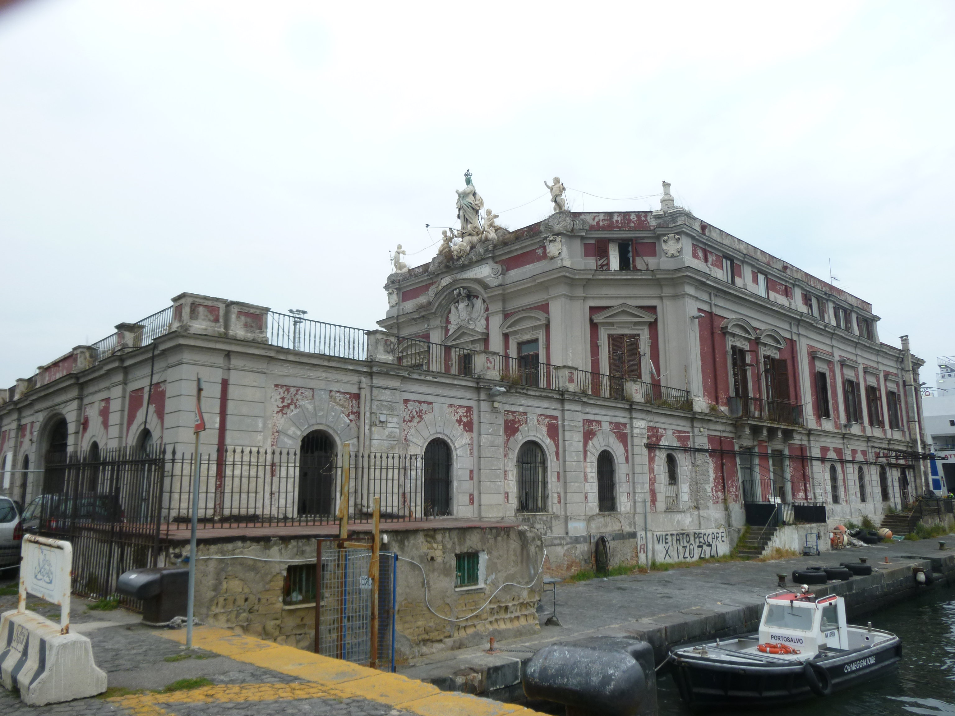 Napoli